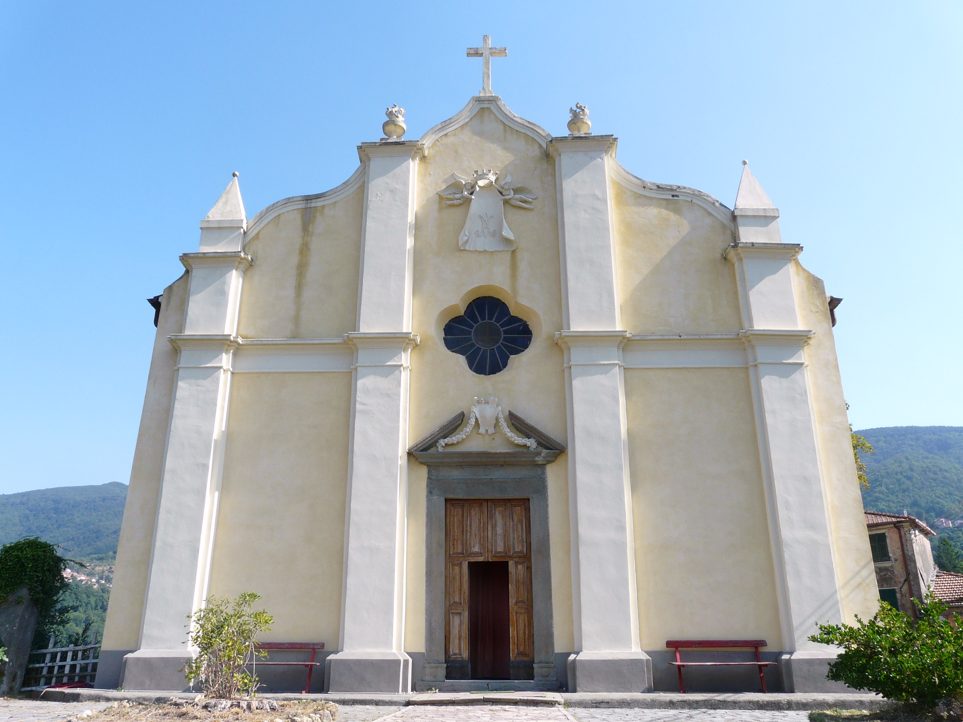 Chiesa di Nostra Signora di Loreto, Calice al Cornoviglio, Liguria, Italia